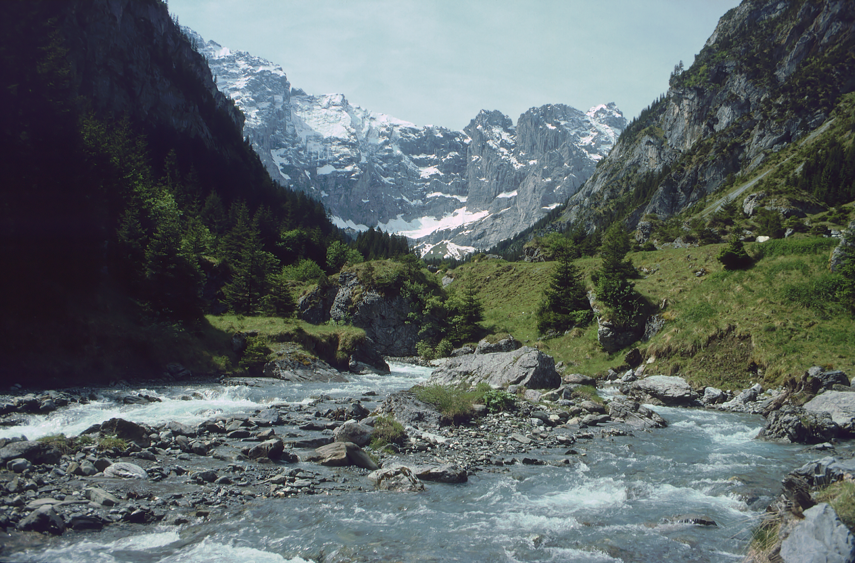 Kanton Uri/Zentralschweiz - Brunnital mit dem 3138m hohen Gross Ruchen als Abschluss.